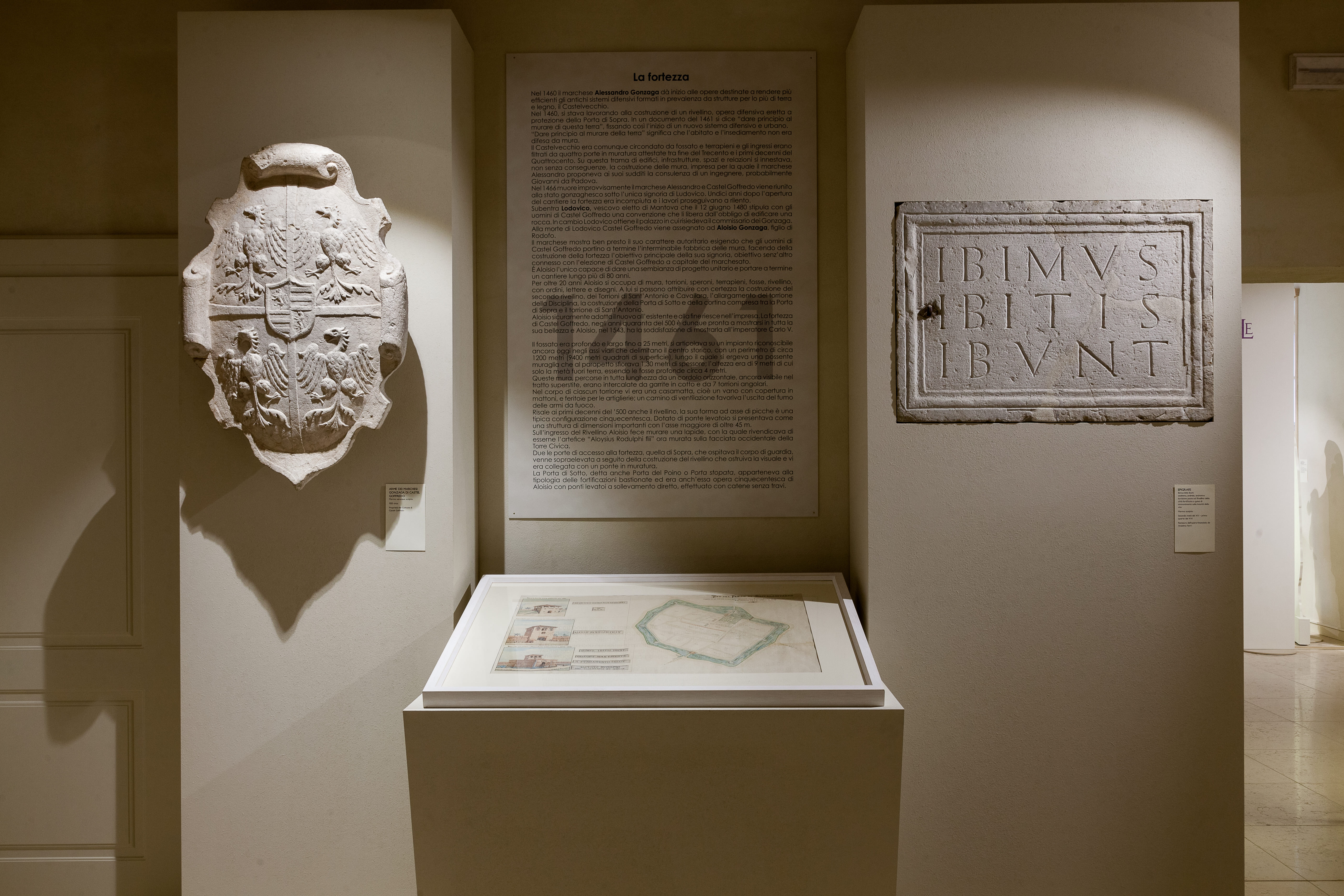 MAST Castel Goffredo-Castrum Vifredi